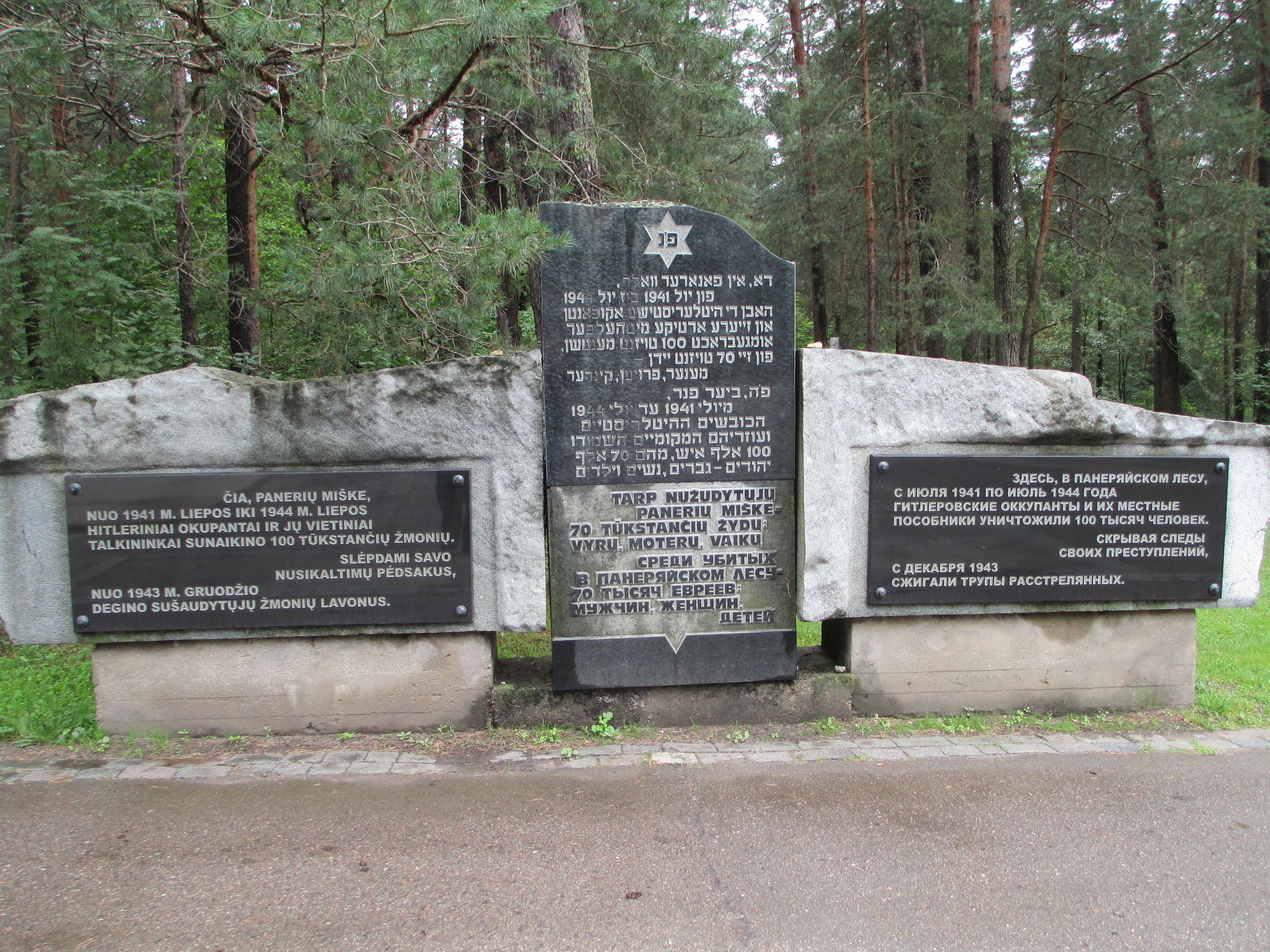 אנדרטה בכניסה ליער פונאר